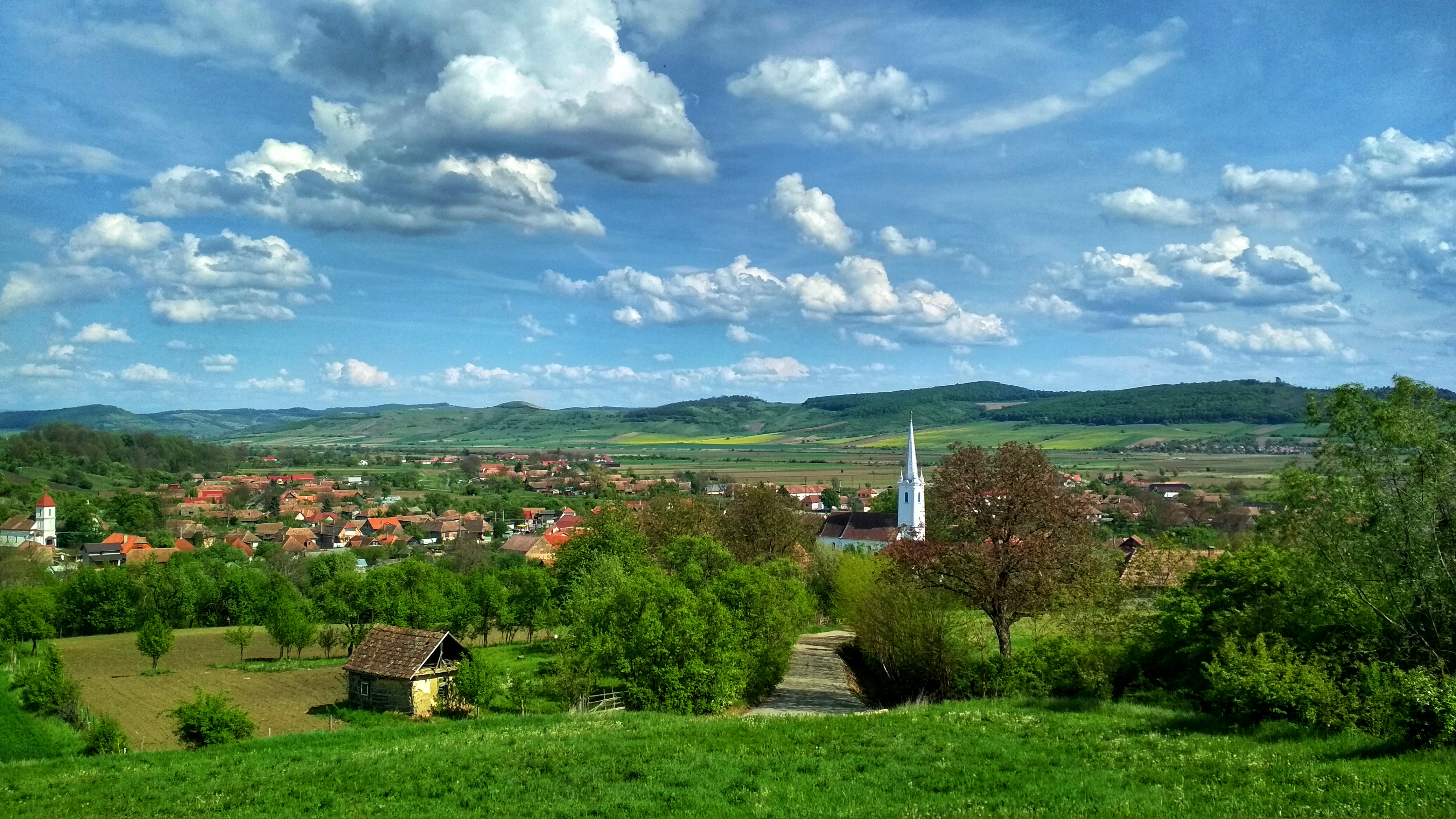 Backamadaras a Backa dombról nézve.